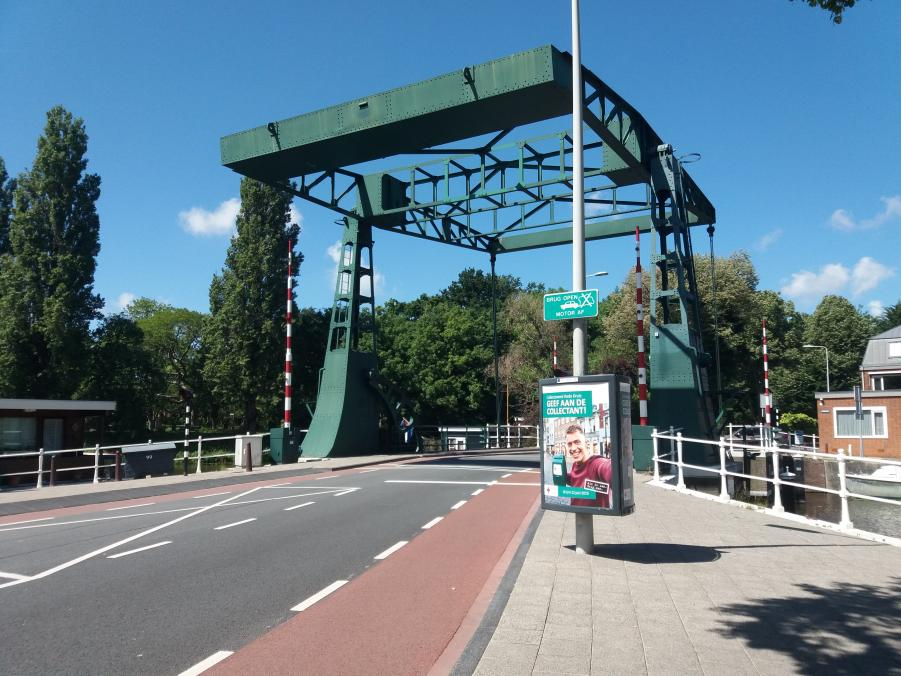 de singelbrug gezien vanuit de utrechtse veer